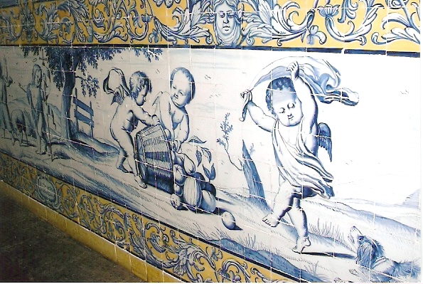 Ajulejos